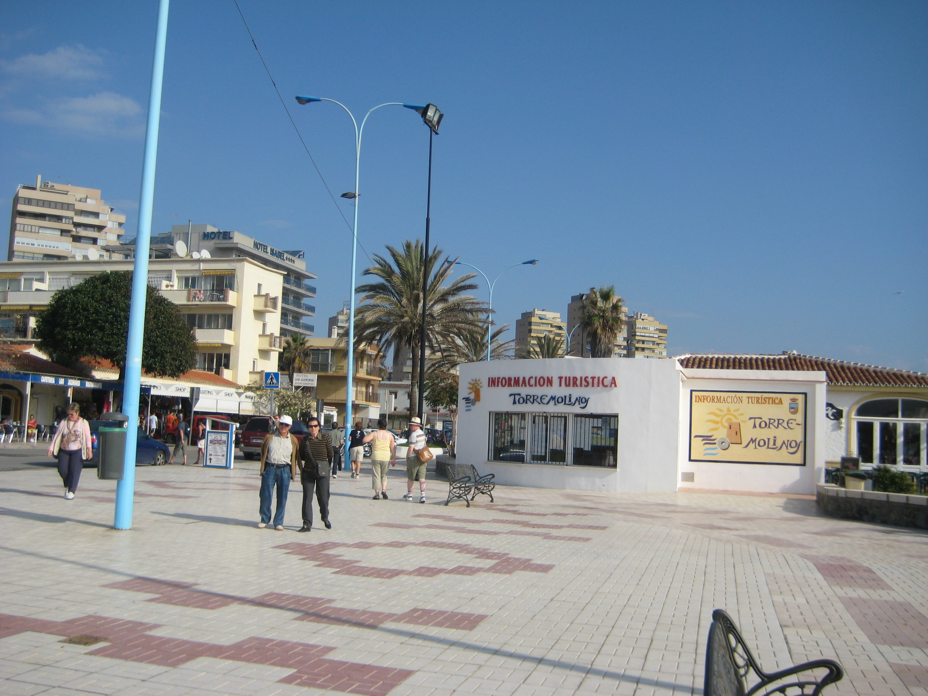 Haaptplaz vu Torremolinos